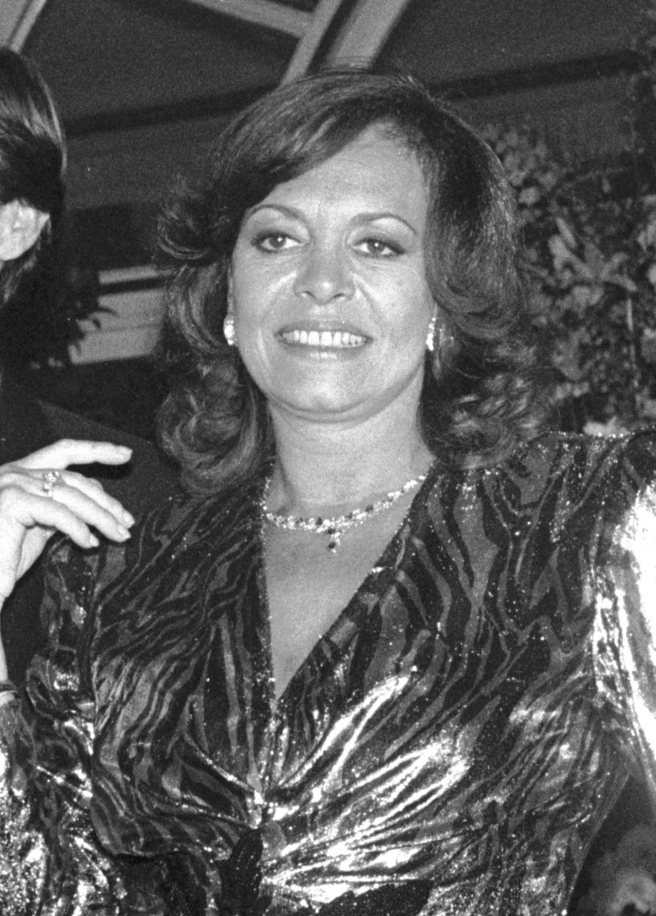 L'actrice française Michèle Mercier au Festival du cinéma romantique de Cabourg en juin 1988.